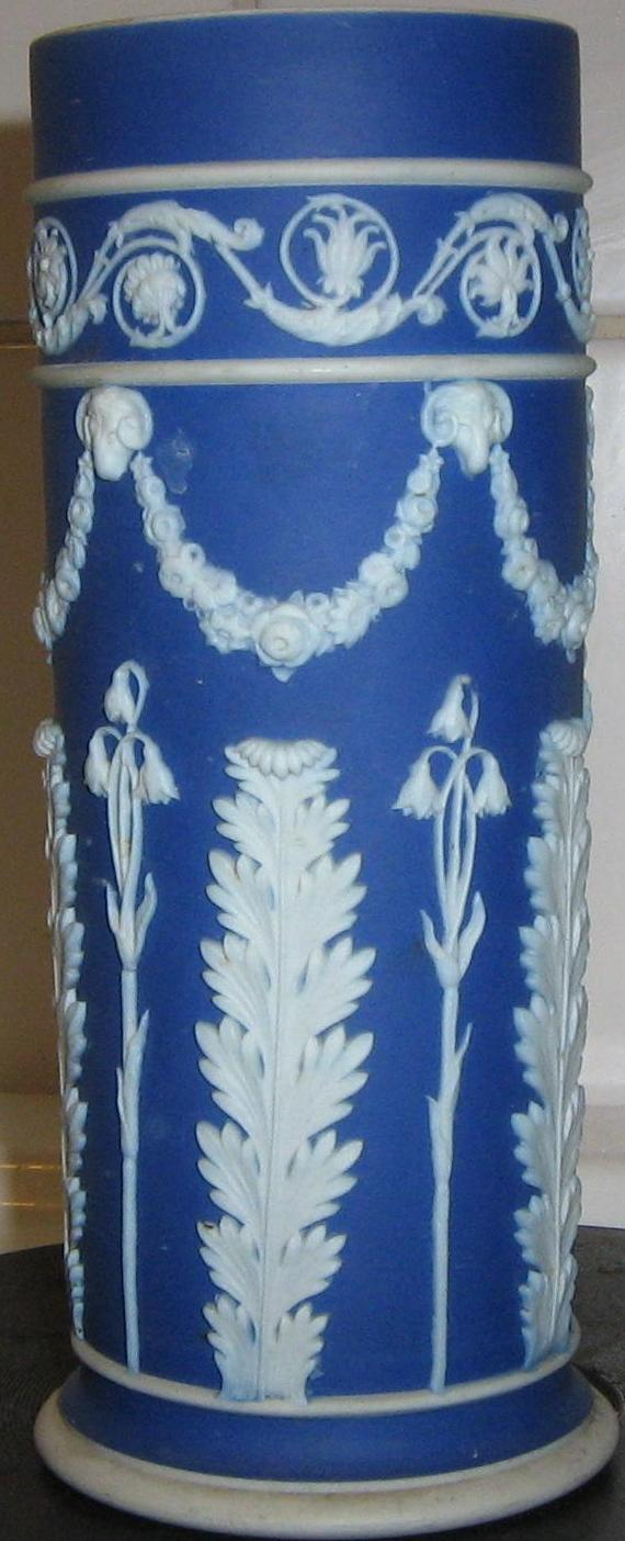 Vas i jasperware från Wedgwoodfabriken, troligen tidigt 1800-tal.